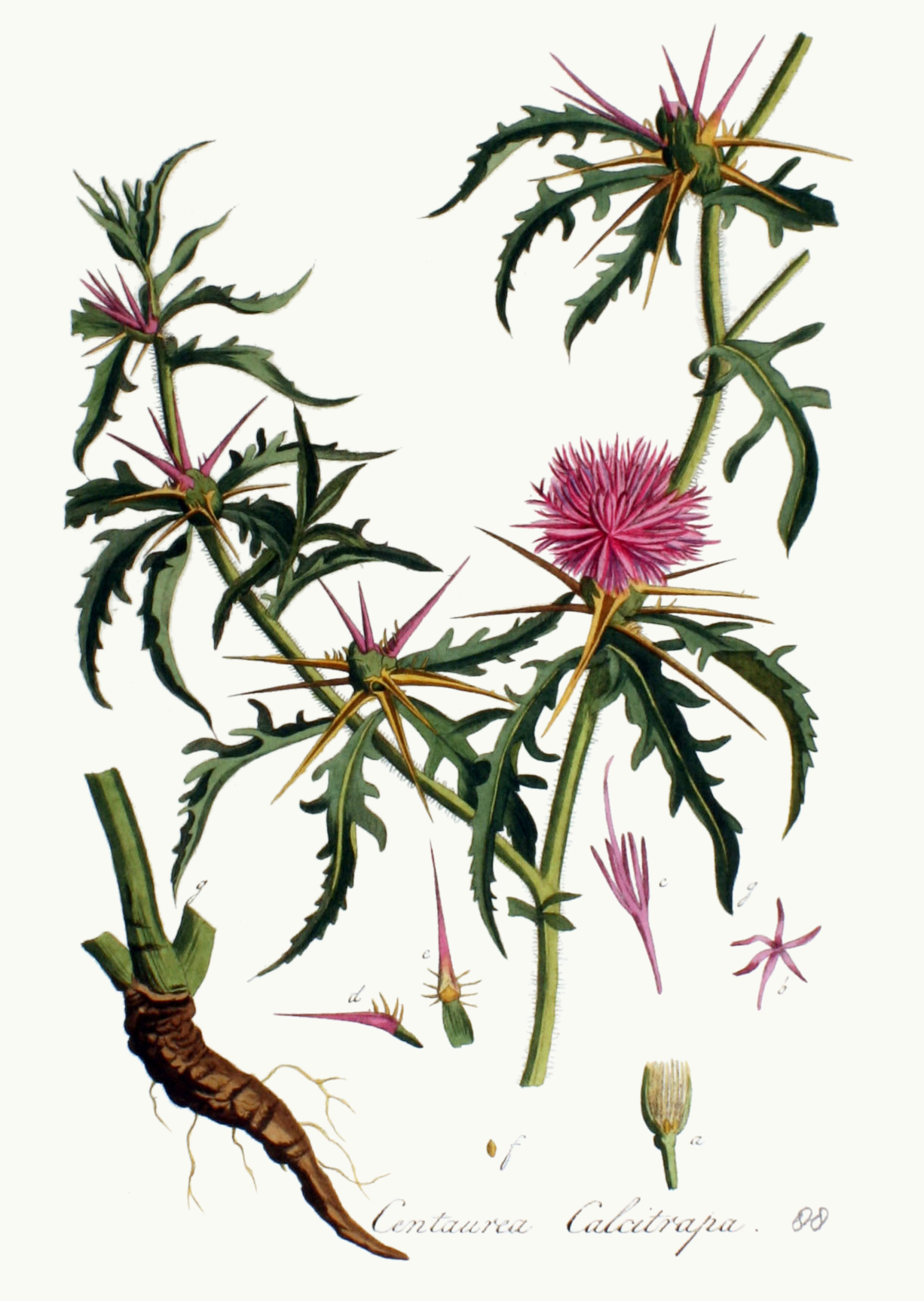 Centaurea calcitrapa l.